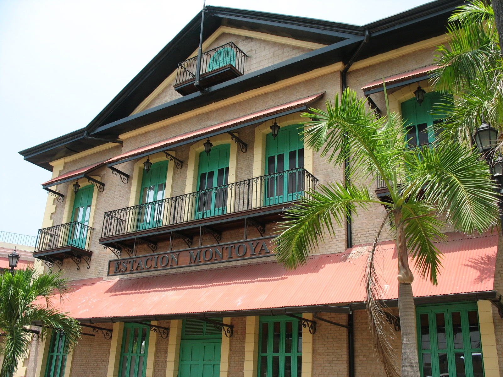 Estación Montoya